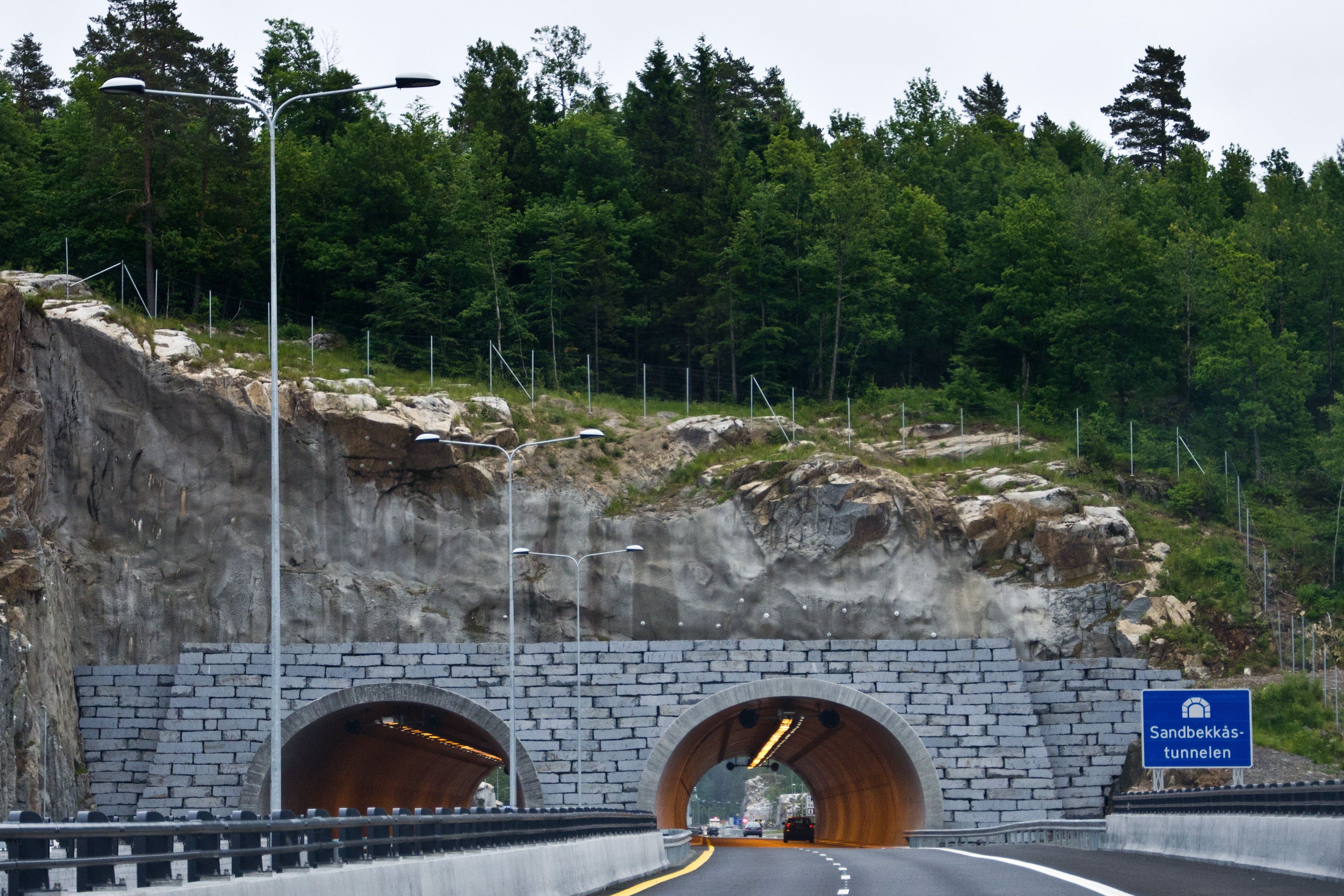 Sandbekkåstunnelen, E18 i Larvik, Vestfold. Sett fra vest.